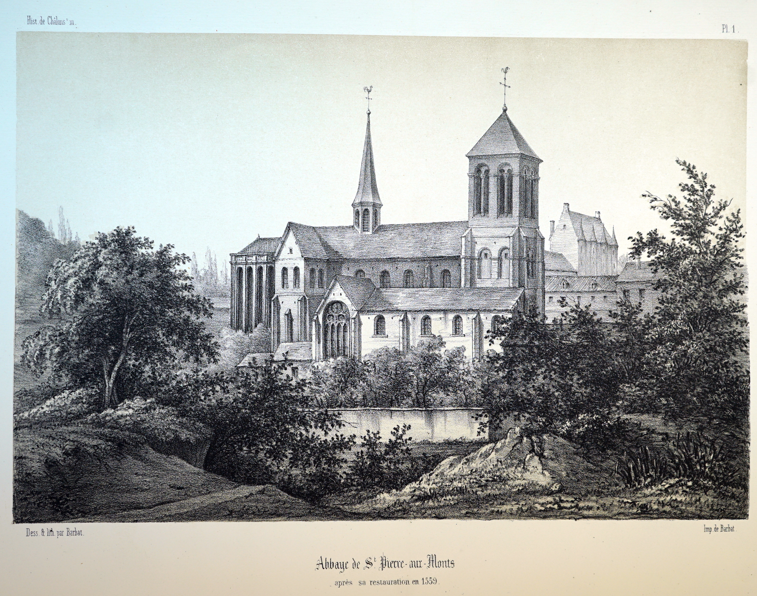 vue ncienne de Châlons-en-Champagne